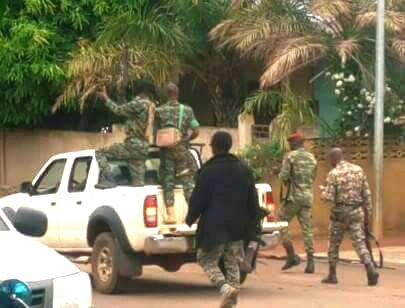 חיילים מורדים ברחובות בונדוקו שבחוף השנהב